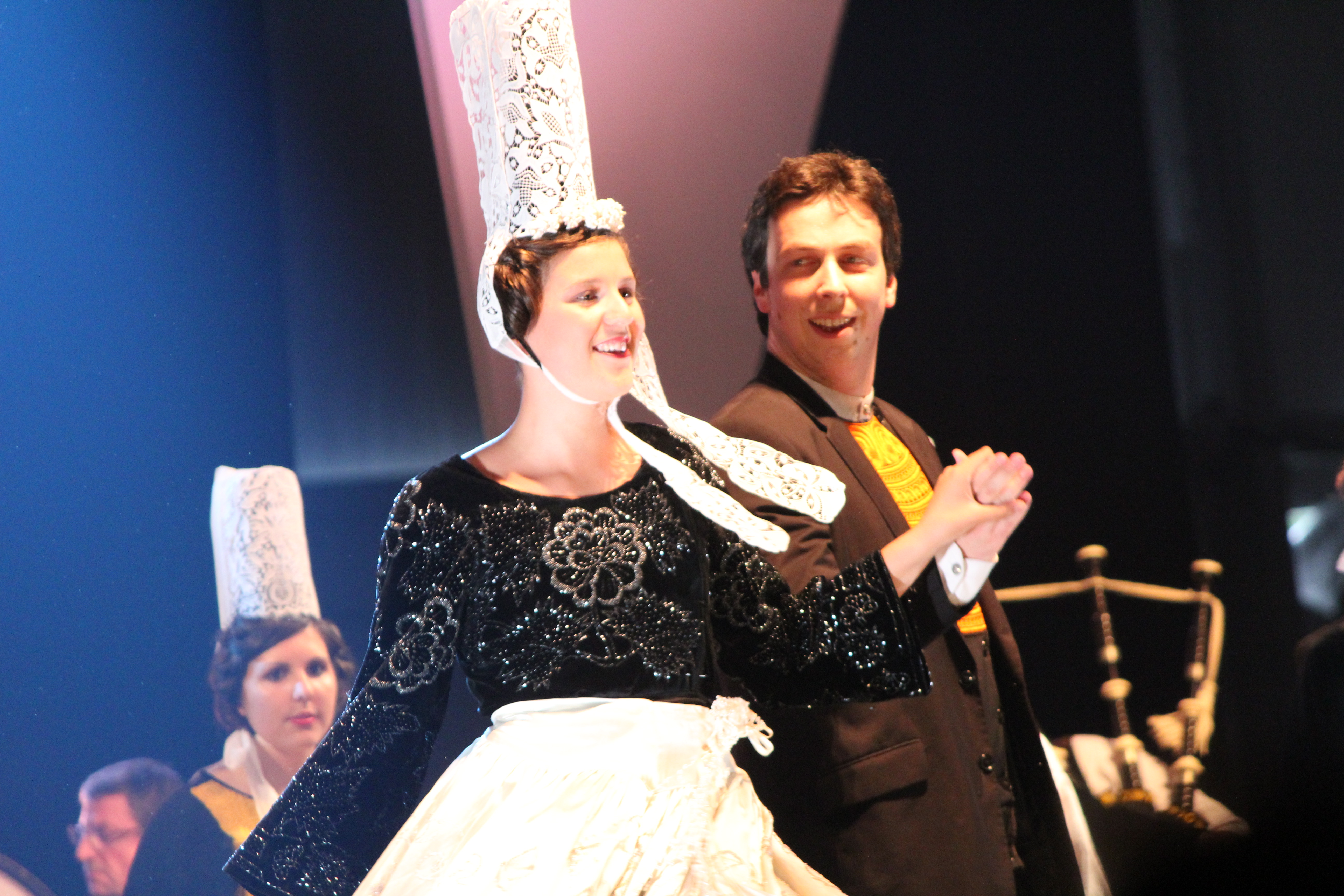 Couple de Bigoudens.